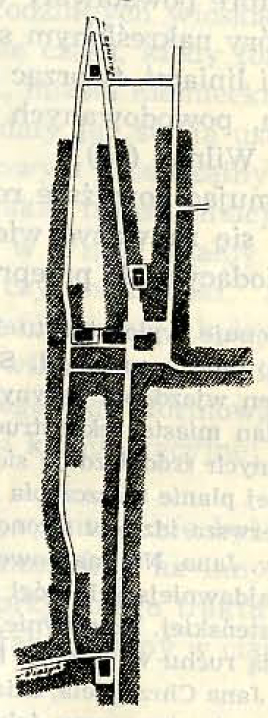 Беларуская (тарашкевіца): Ільля (Illa)